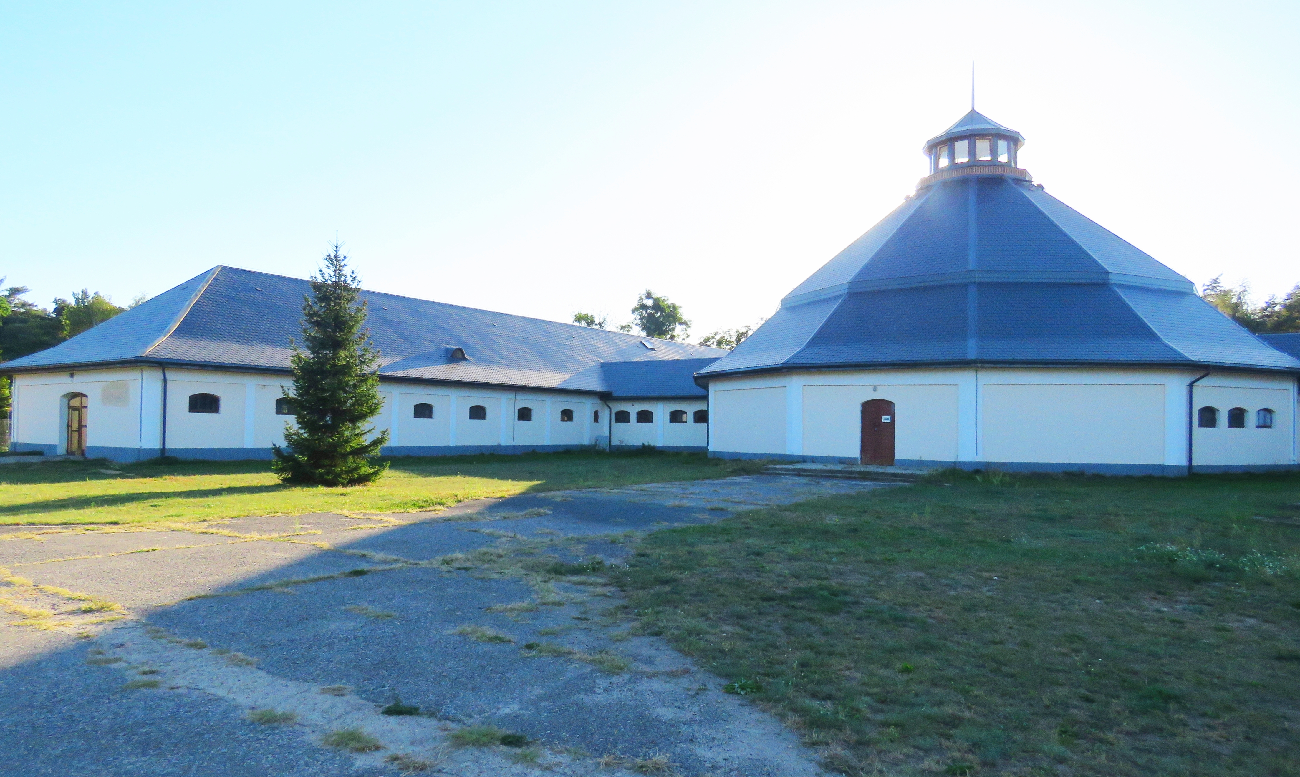 Państwowa Szkoła Sztuk Cyrkowych w Julinku